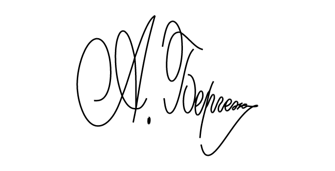 Подпись - личная шифровка ФИО или данных о себе.